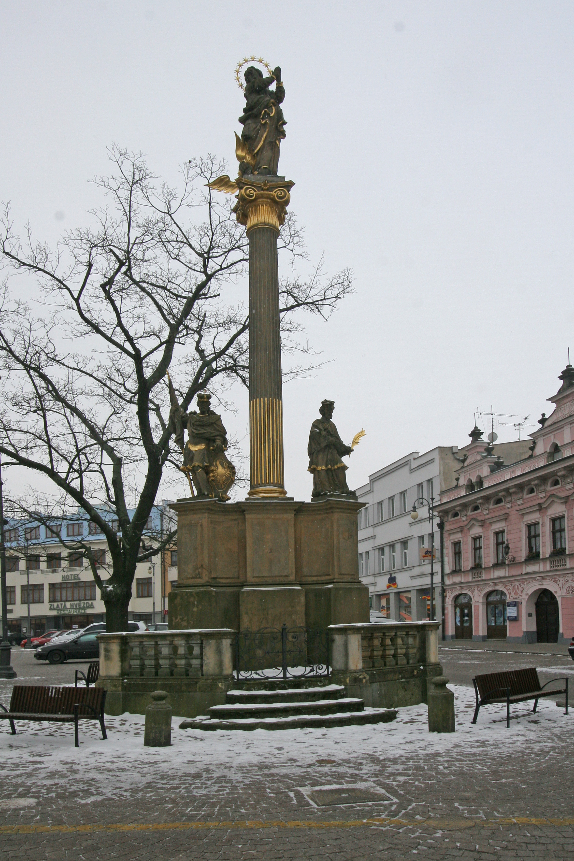 Sousoší - Mariánský sloup (Litomyšl), Smetanovo nám., Litomyšl